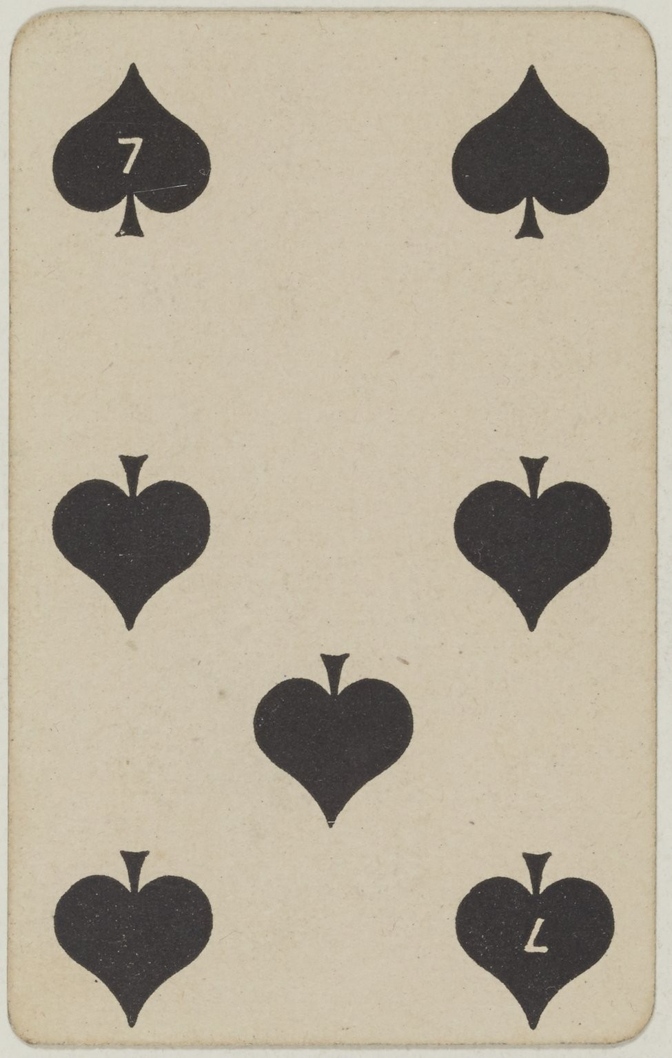 Siódemka Pik z Wzoru Berlińskiego